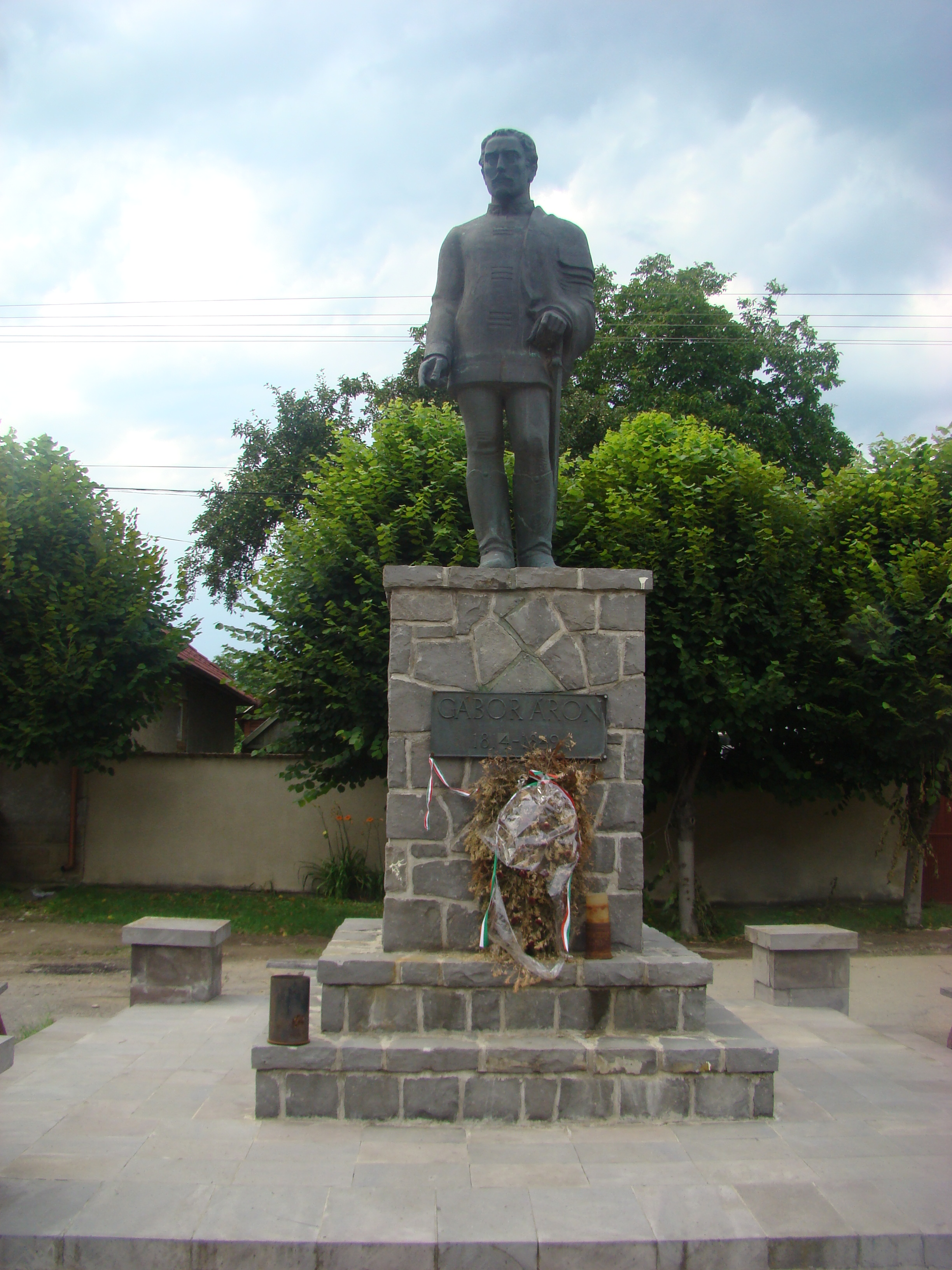 Brețcu, județul Covasna